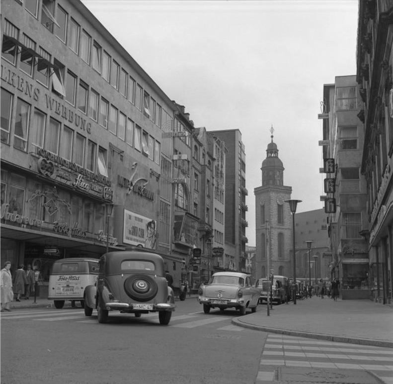 Oktober 1958 Frankfurt/Main Steinweg und Katharinenkirche